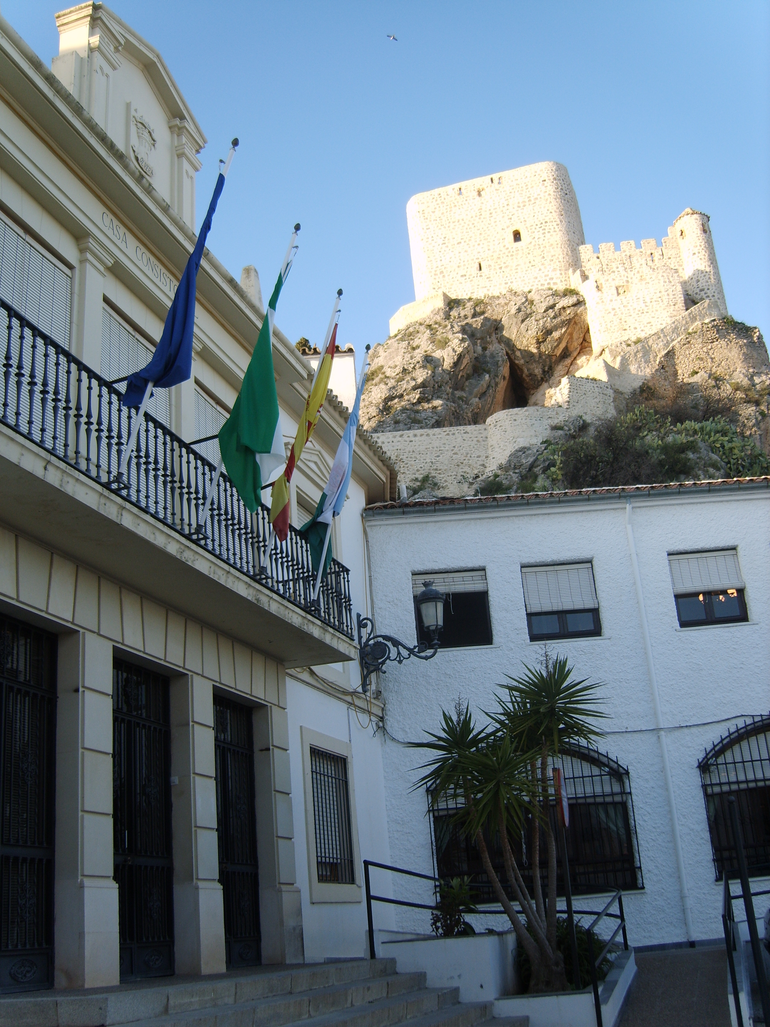 Castillo árabe junto al ayuntamiento de la ciudad de Olvera.